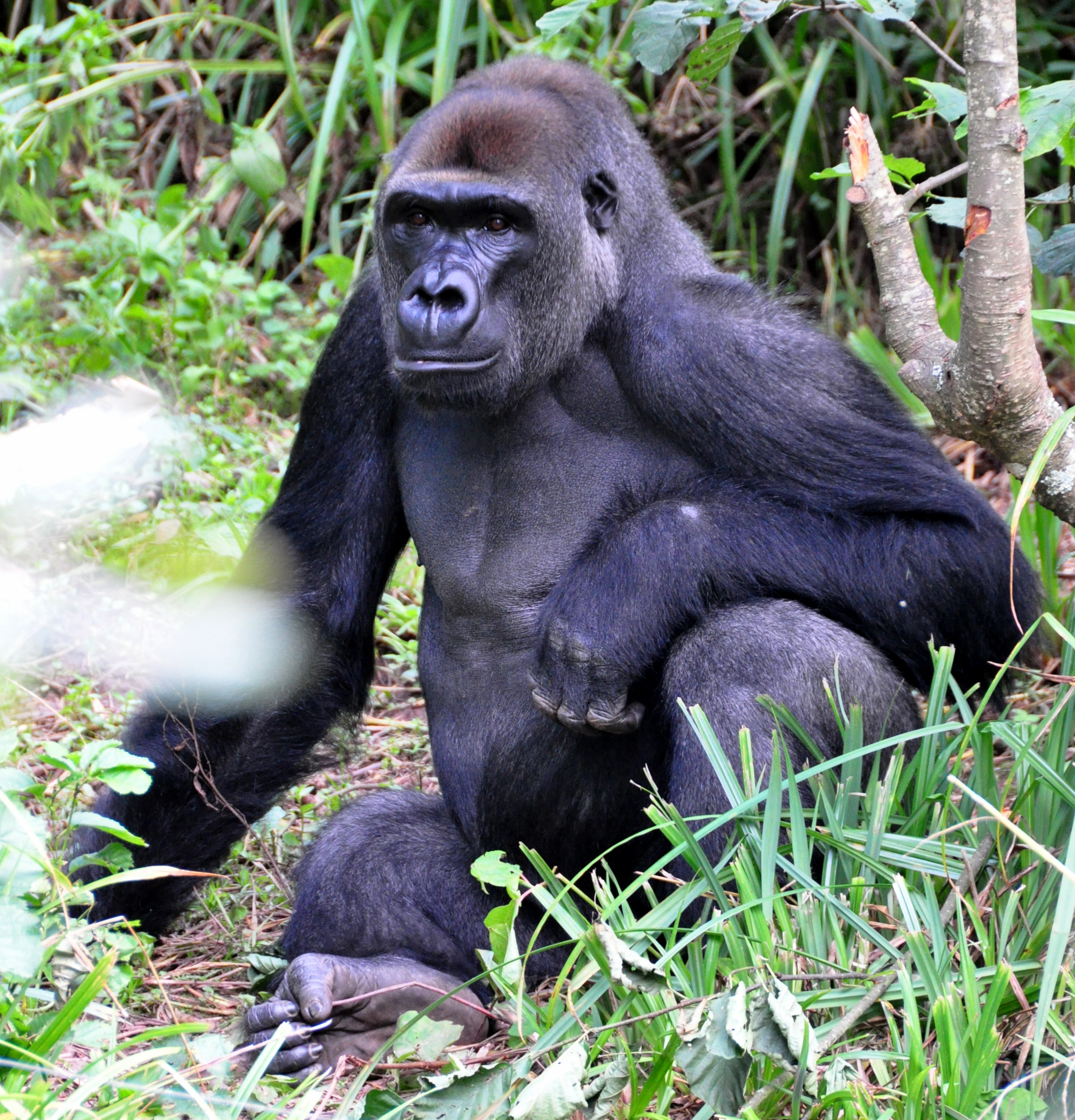 A gorilla at Paignton Zoo in Devon.